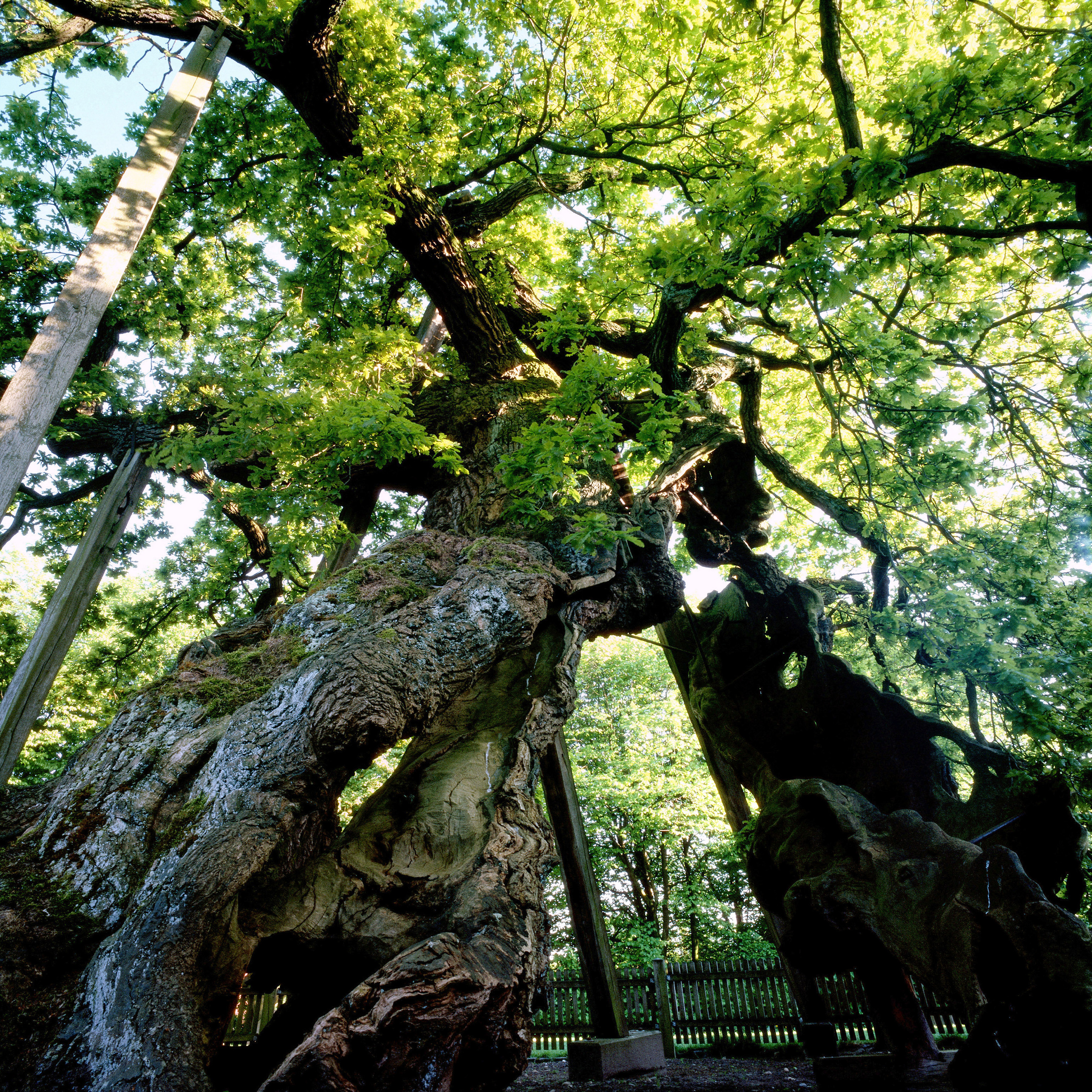 Naturdenkmal "Erler Femeiche" im Naturpark "Hohe Mark". 1500 jährige ehemalige Gerichtseiche und frühgeschichtliche germanische Kultstätte im Ortsteil Erle der Gemeinde Raesfeld.